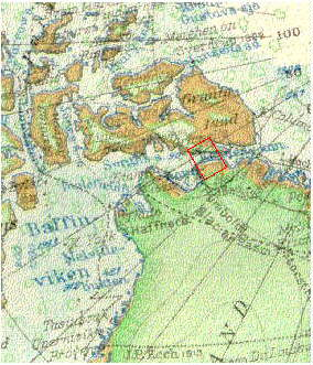 Nordvästra Grönland med Hans ø och Kennedy strait markerat Eftersom texten är på svenska, känns det inte motiverat att flytta den till commons.